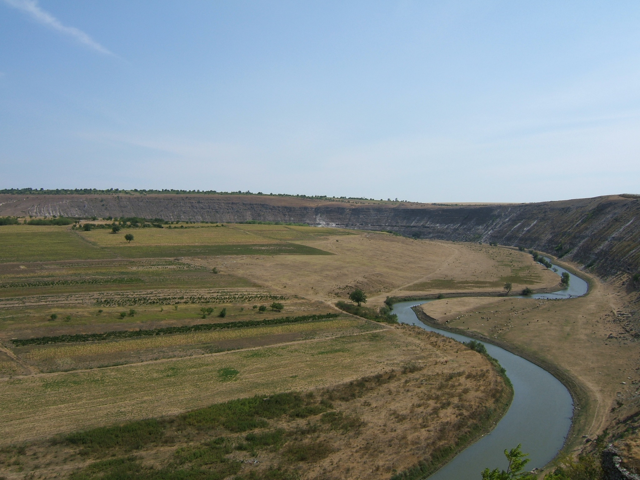 Valle del monasterio Orheiul Vechi (Orhei-Moldavia)